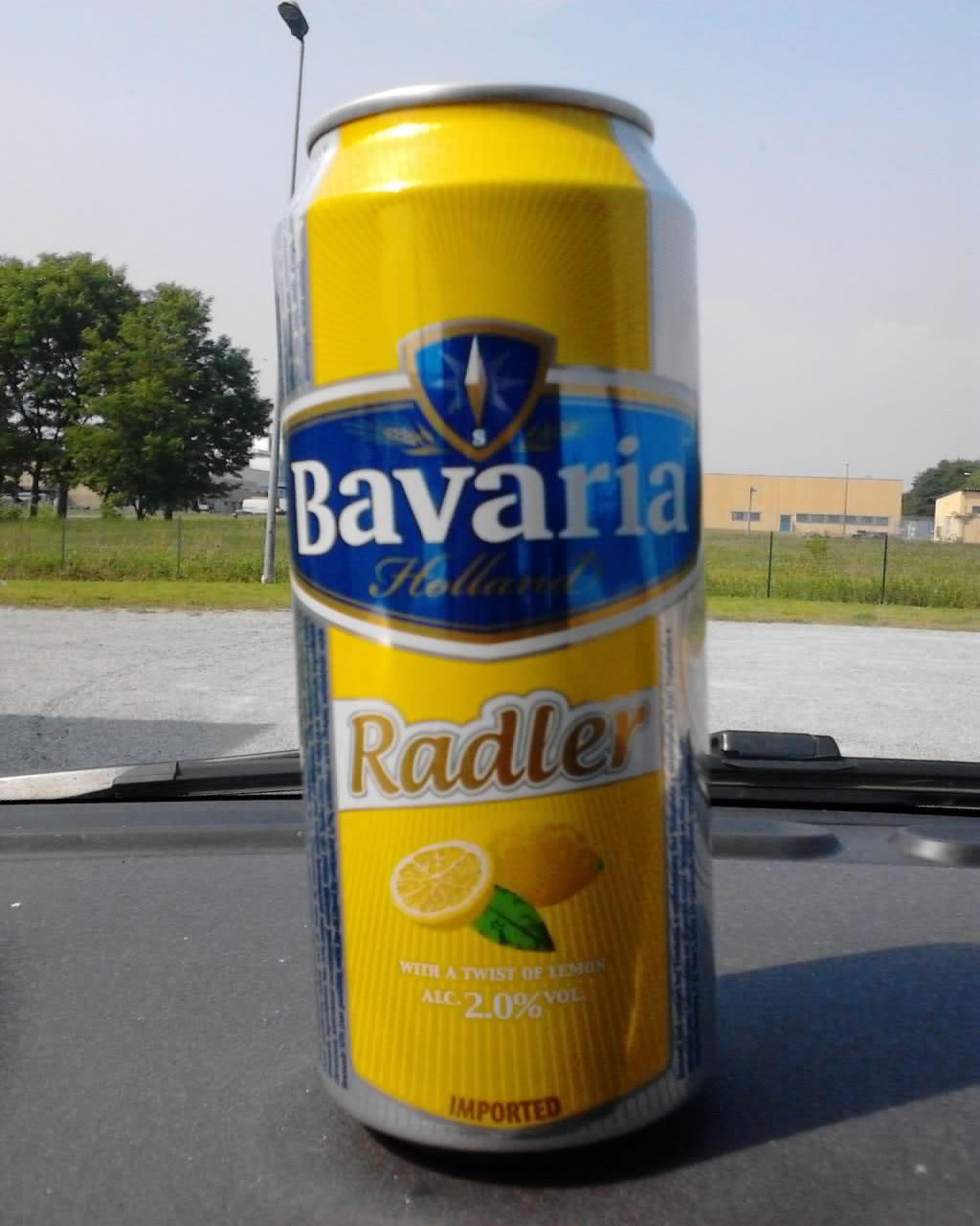 Bavaria Radler